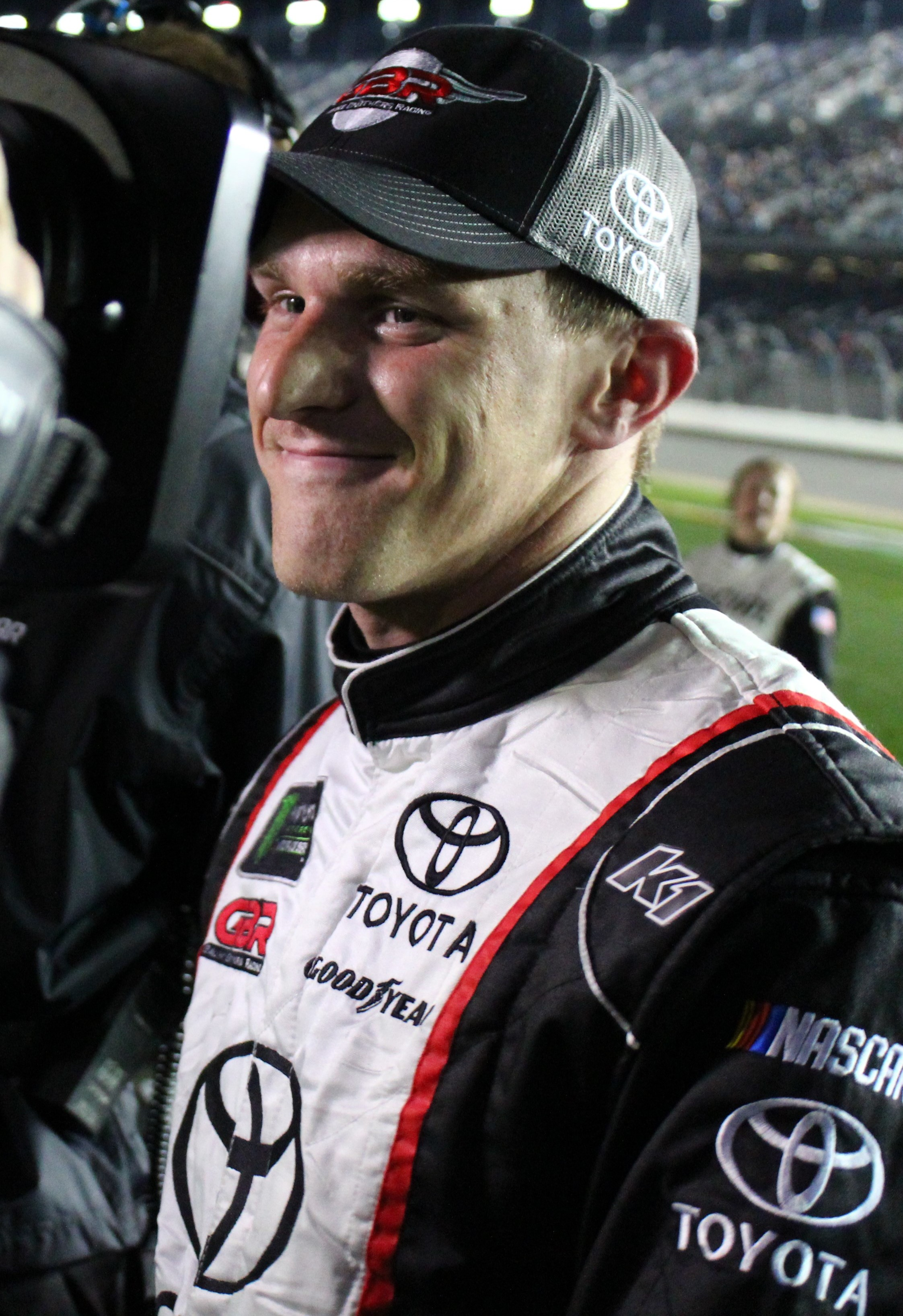 2019 Daytona 500